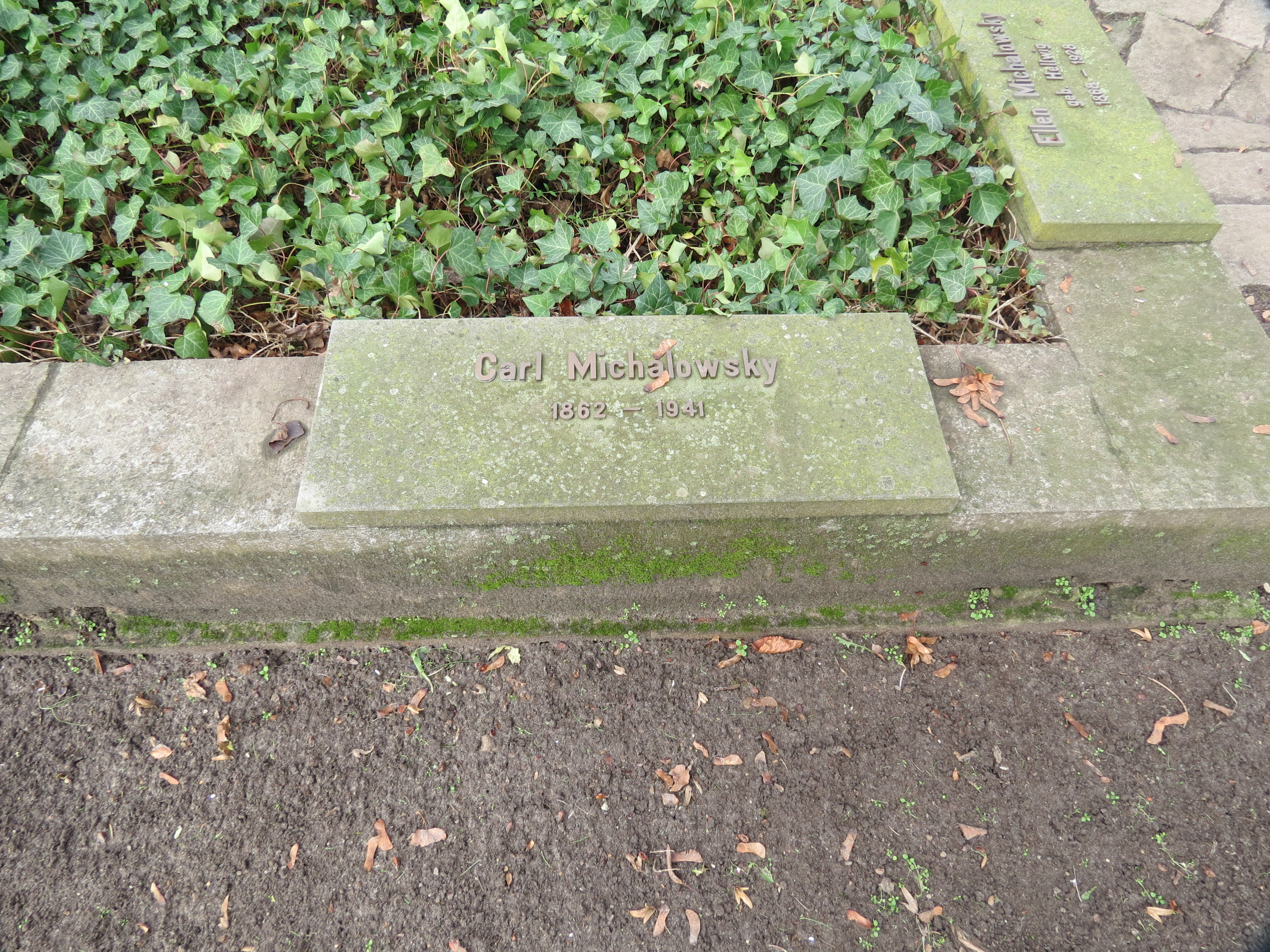 Grabplatte des Carl Michalowsky (1862-1941), an der Umfassung, Erbbegräbnis Michalowsky, Dorfkirche Neu-Temmen, Neu-Temmen, Gem. Temmen-Ringenwalde, Lkr. Uckermark, Brandenburg